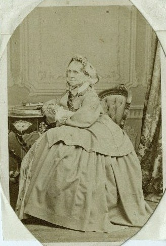 Юлия Фёдоровна Баранова (Доротея Елена Юлиана), урождённая Адлерберг (1789—1864)